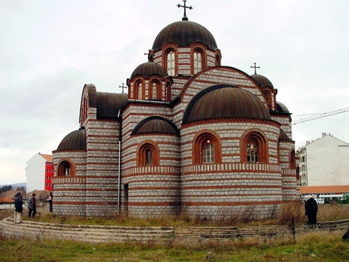 Црква Мала Госпојина у центру Обилића.JPG